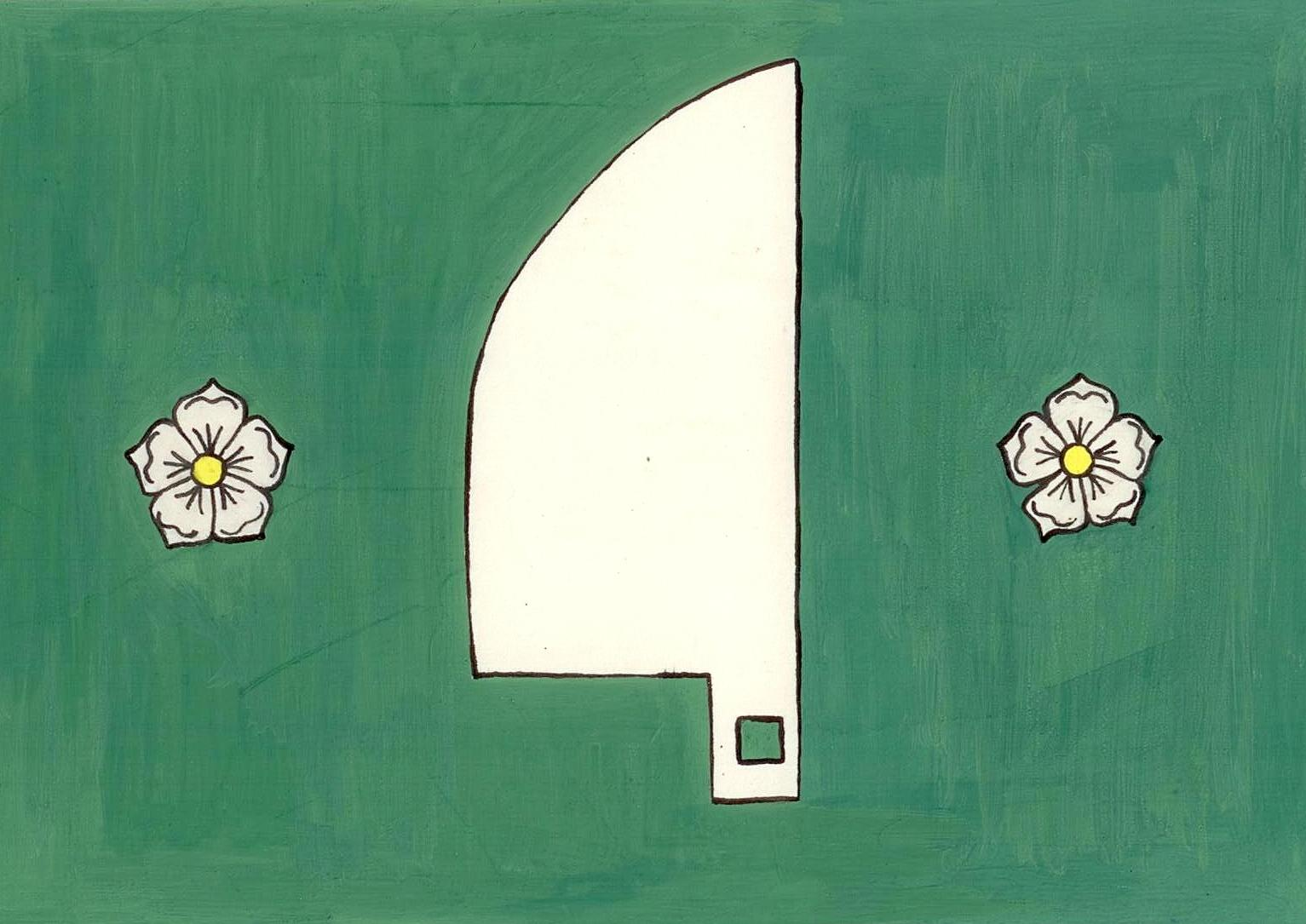 Vlajka Obce Neplachovice